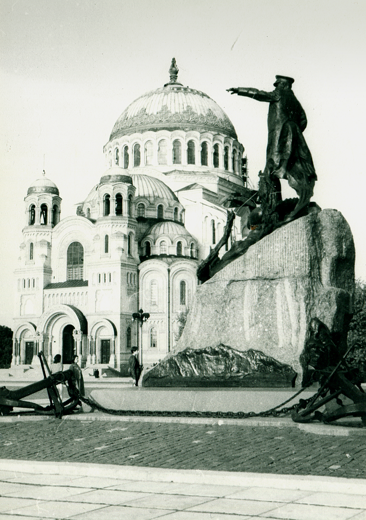 Памятник адмиралу Макарову на фоне Никольского собора